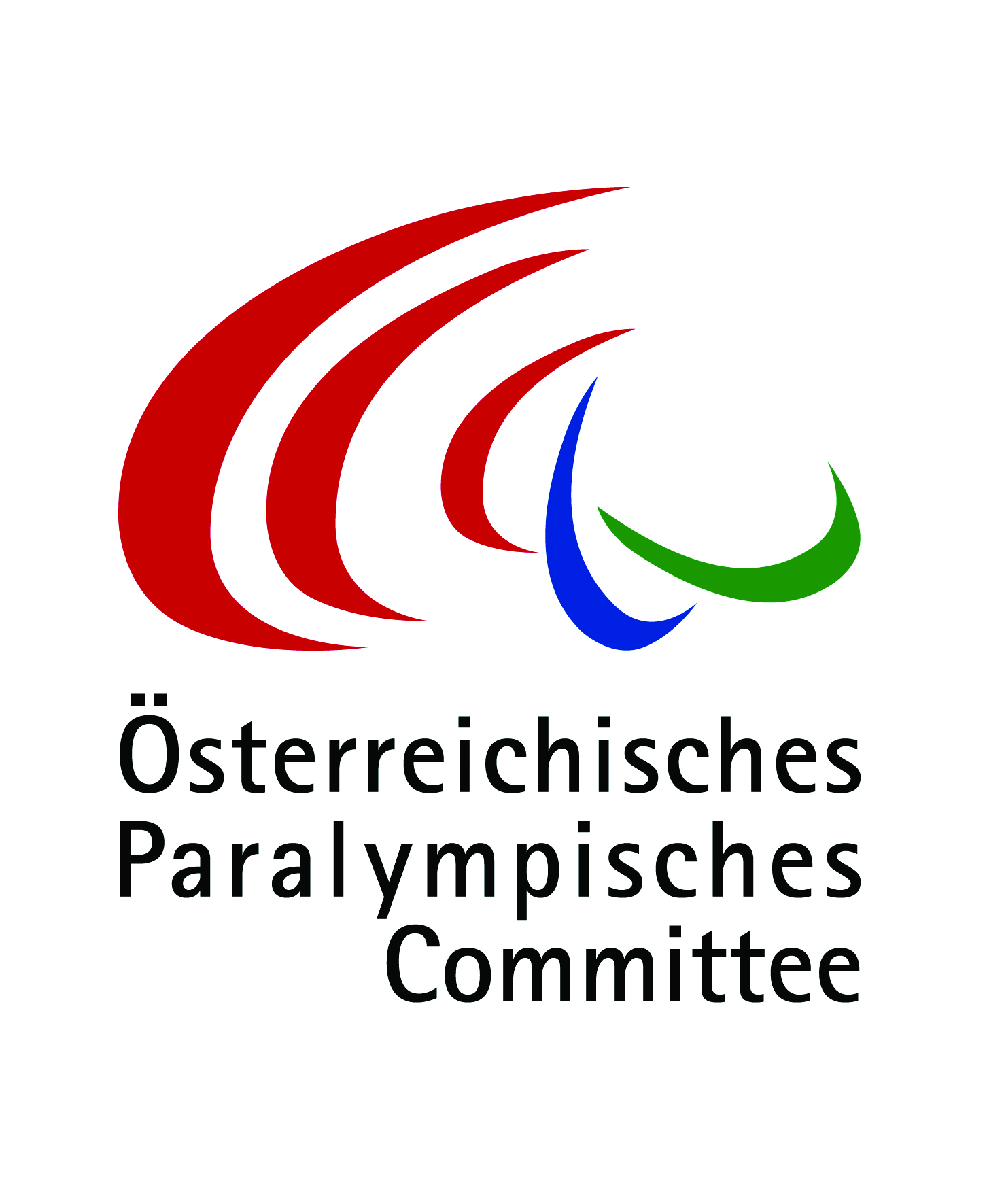 Österreichisches Paralympisches Committee (ÖPC)